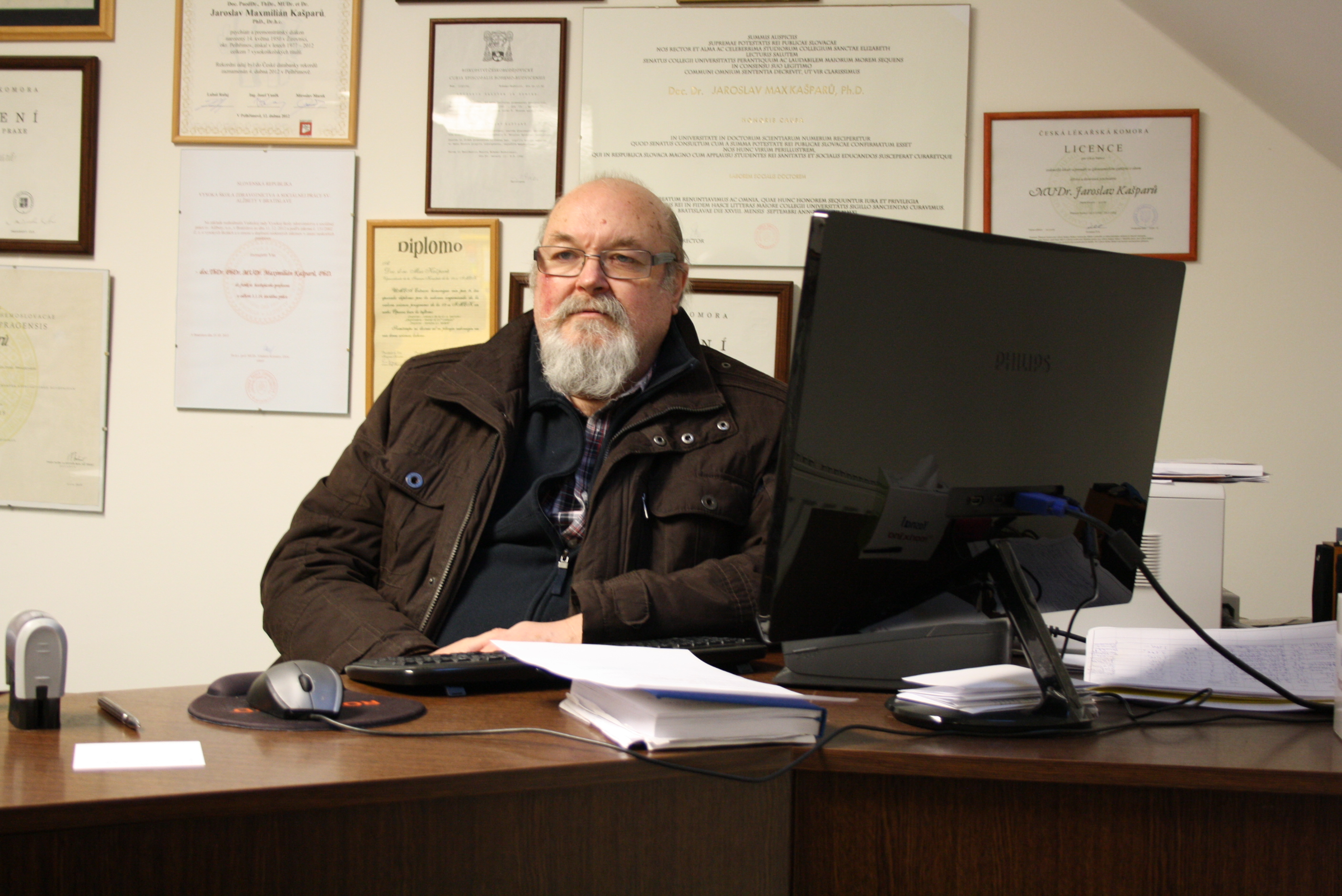 Jaroslav Maxmilián Kašparů ve své ordinaci v Pelhřimově